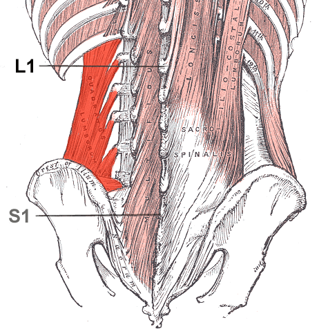 Quadratus lumborum muscle